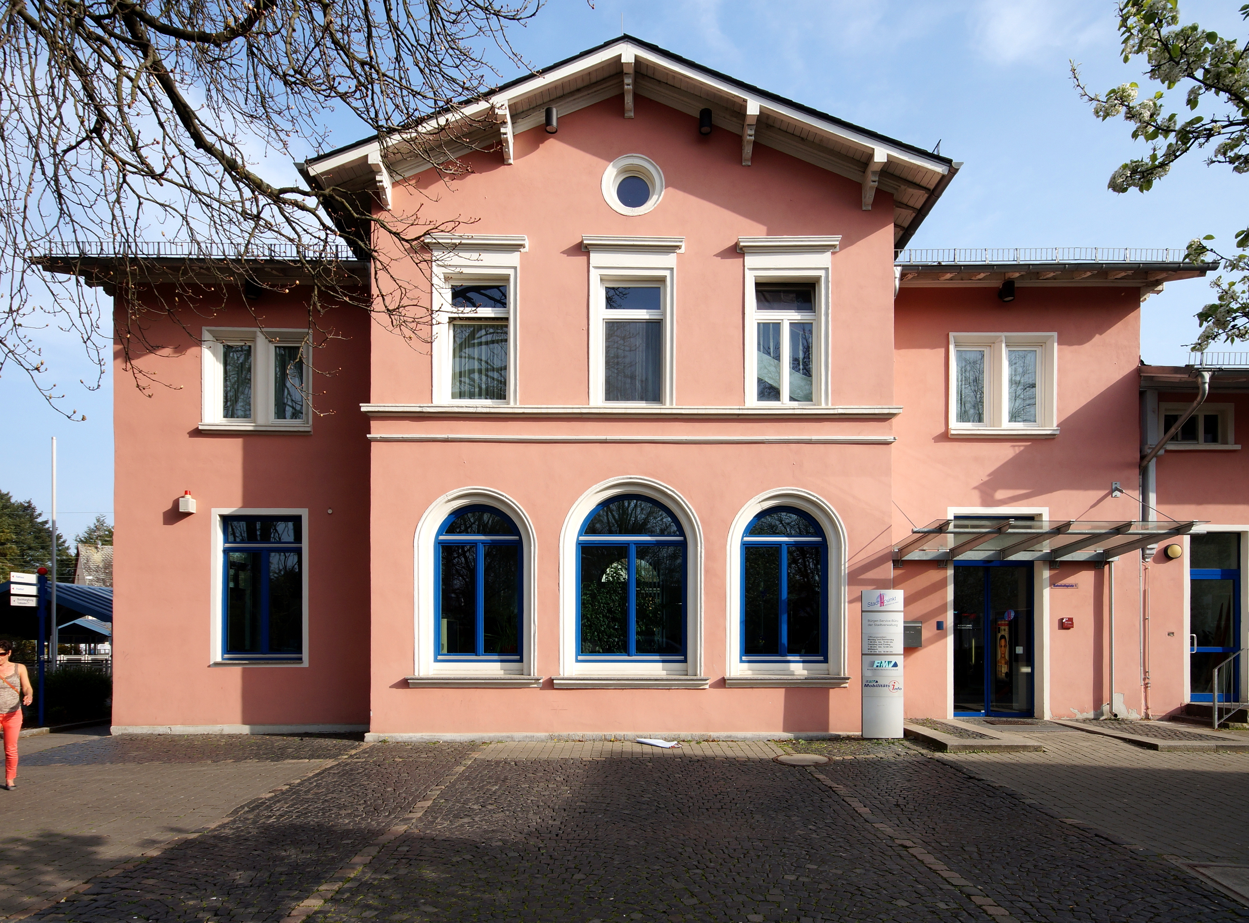 Das Bahnhofsgebäude des Bahnhofs Hattersheim (Main) der Stadt Hattersheim am Main